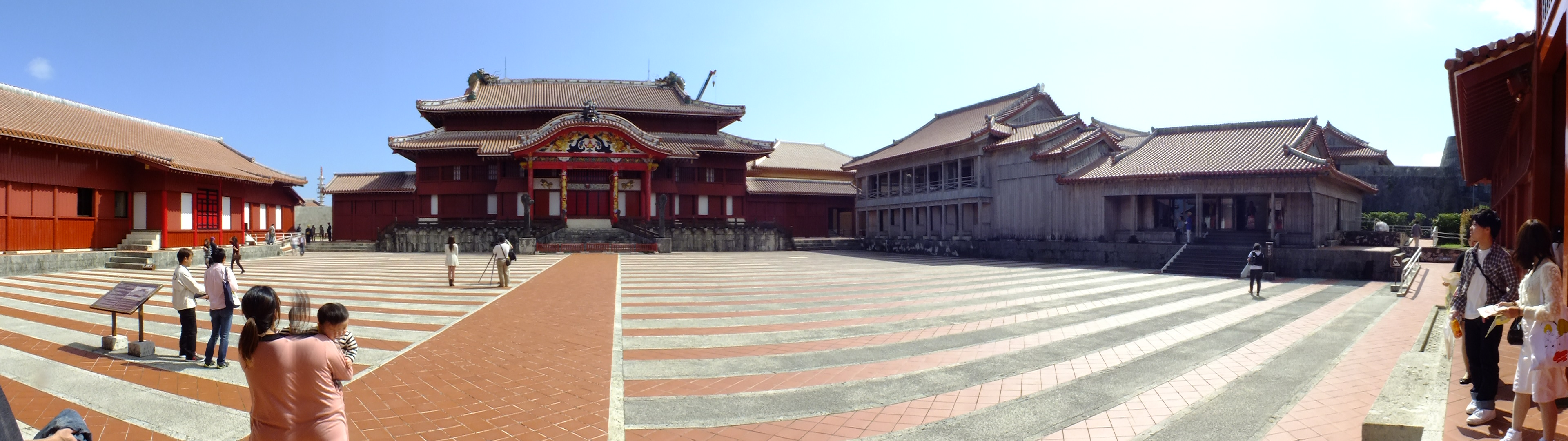 2014-02-28 Shuri Castle,Naha,Okinawa 首里城正殿（沖縄県那覇市 ）